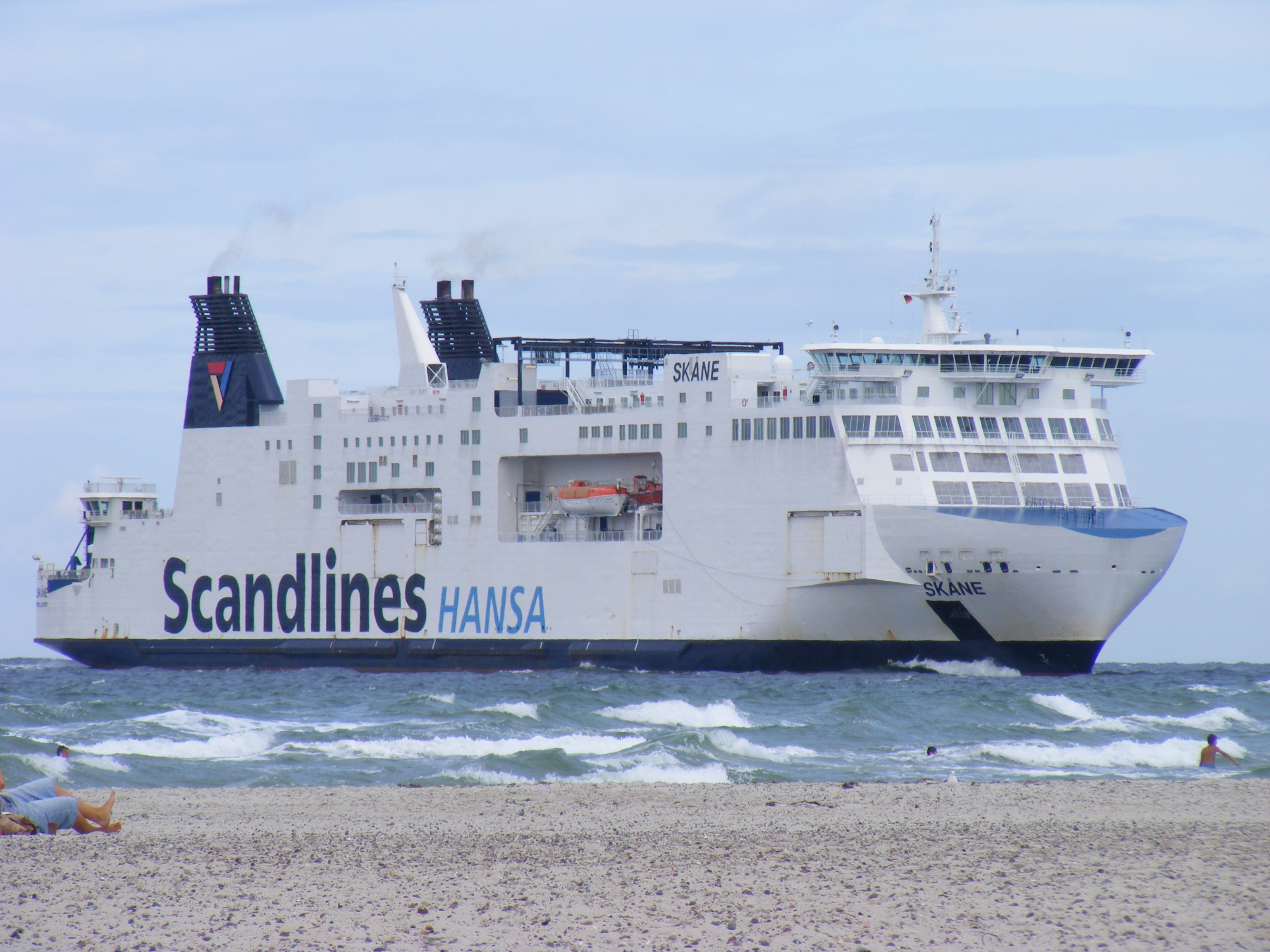 Fährschiff "Skåne" bei Einlaufen in Warnemünde, Deutschland